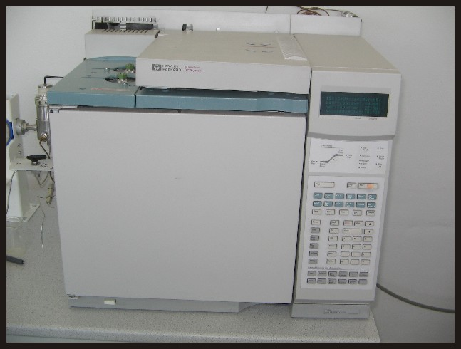 chromatograf Licensing